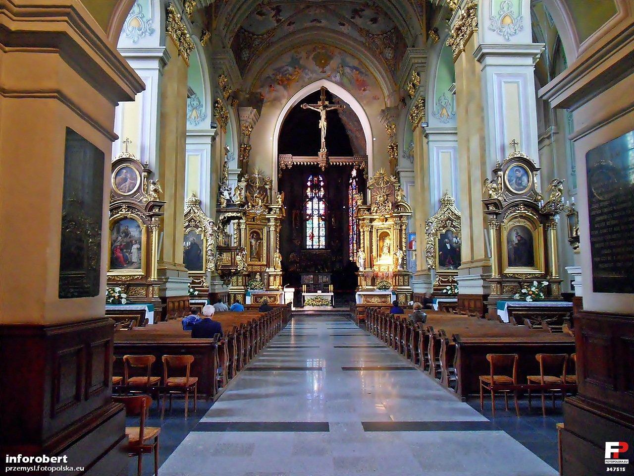 Wnętrze Bazyliki Archikatedralnej.